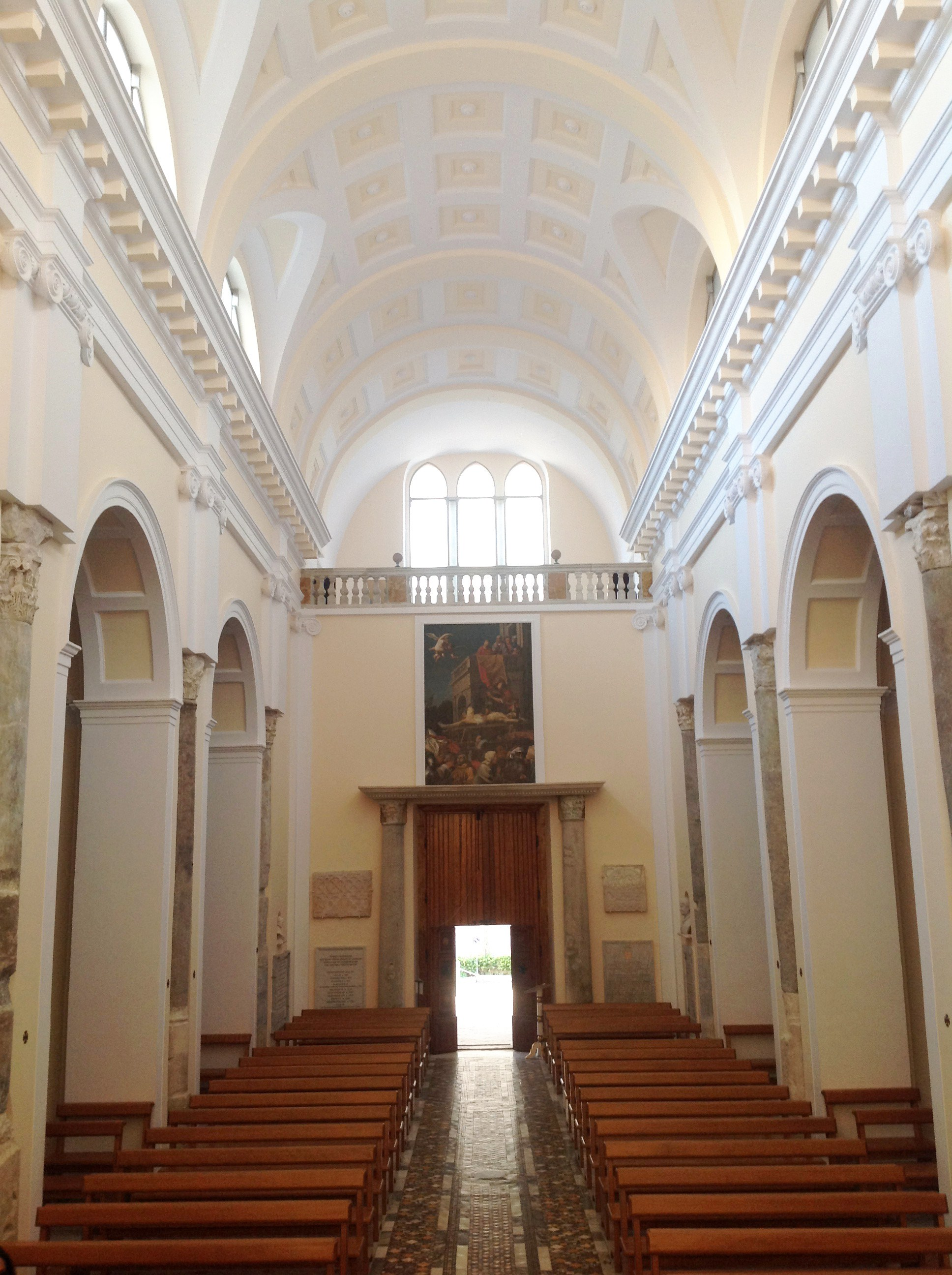 Interno della navata centrale e controfacciata.